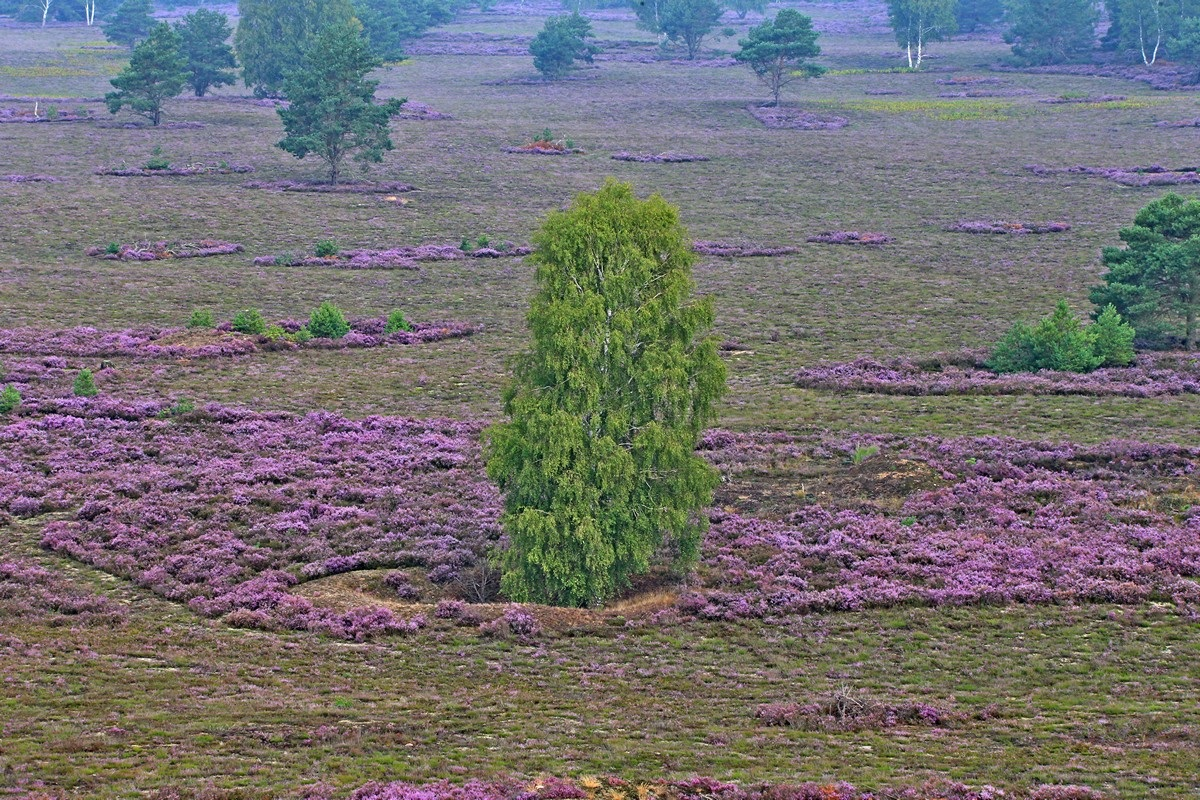 Wittstock-Kyritzer Heide zur Blütezeit